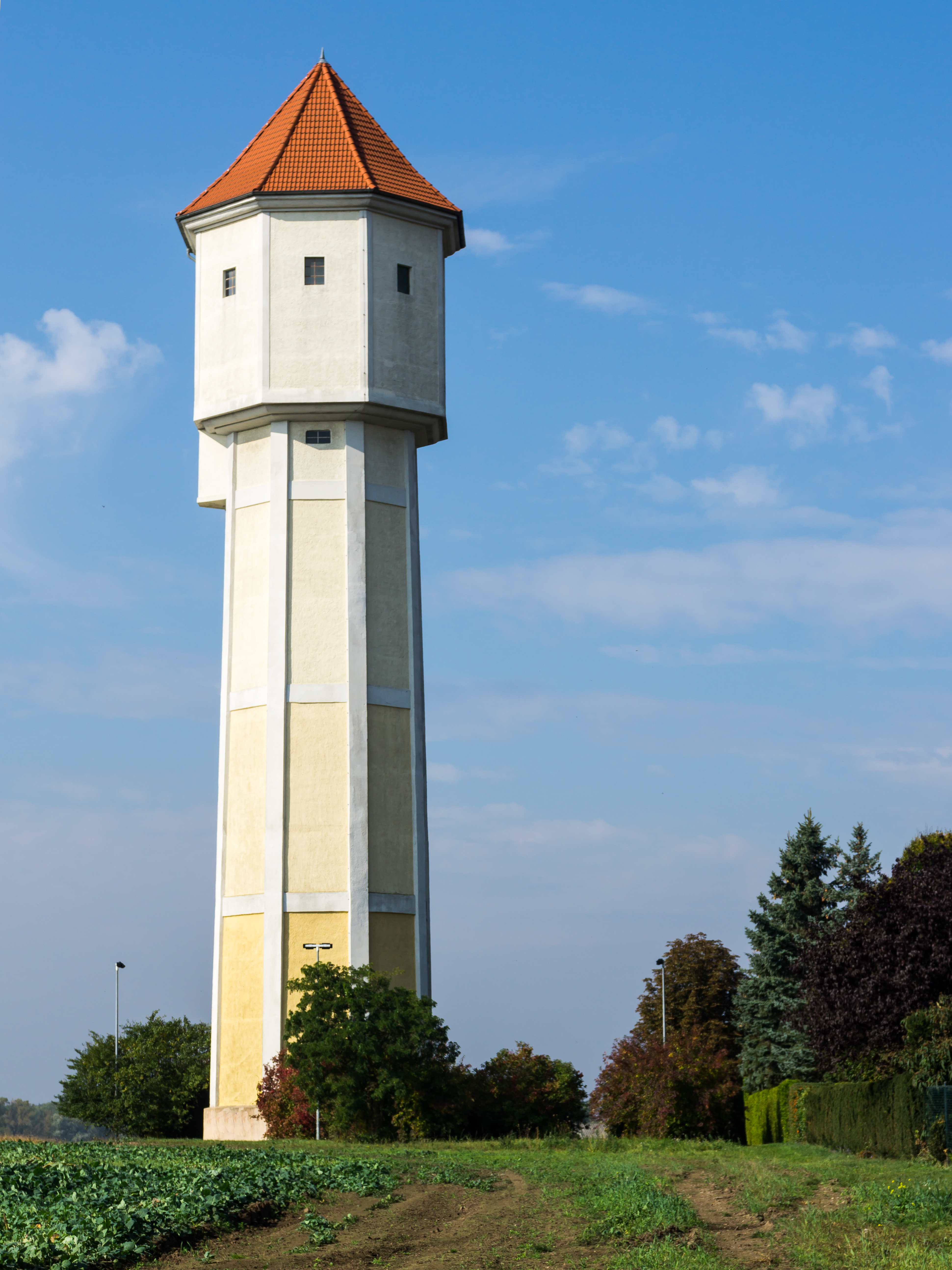 Wasserturm, Staßfurter Straße südöstliches des Ortes in der Neubausiedlung, in Staßfurt OT Löderburg